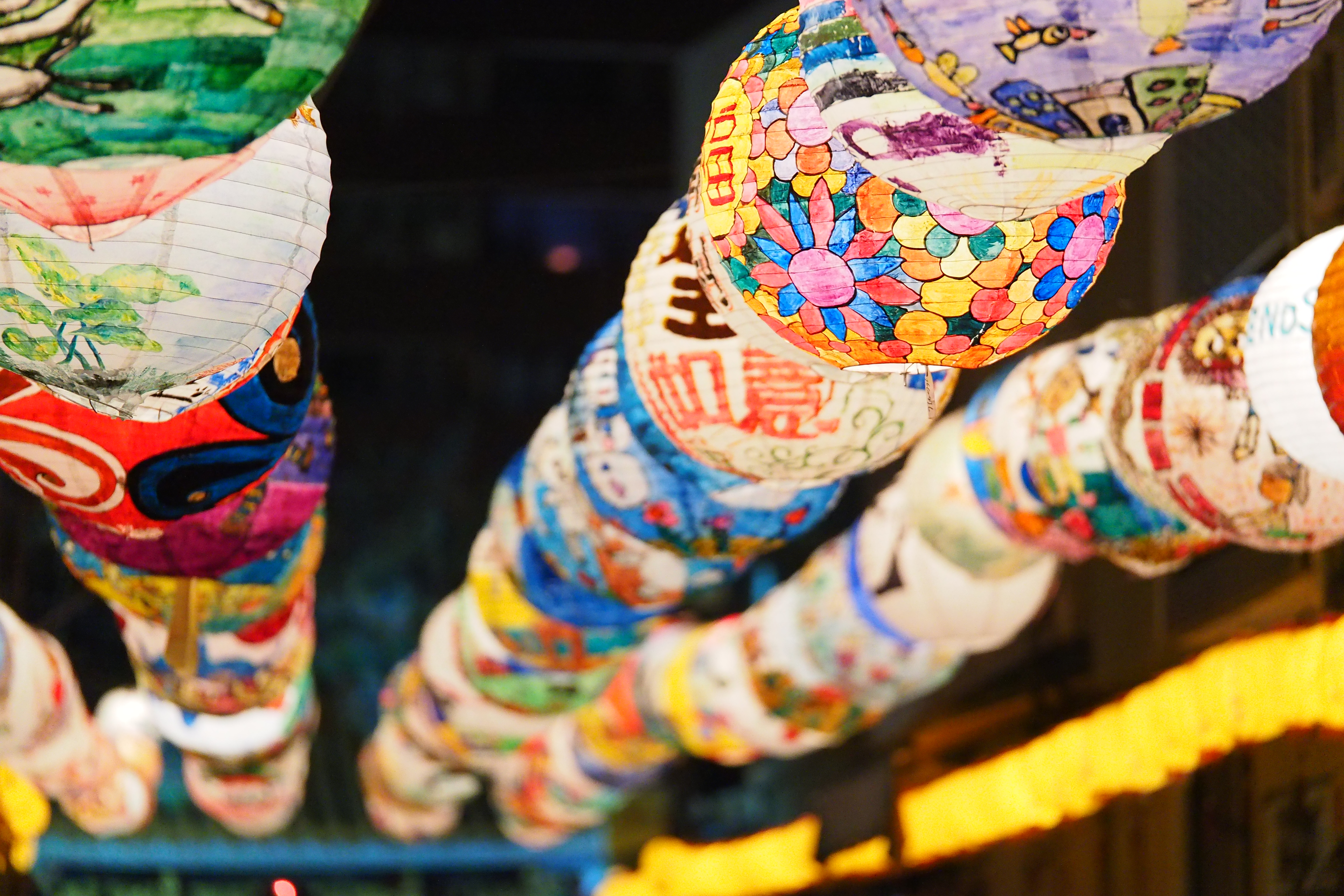 台南媽祖樓 燈籠